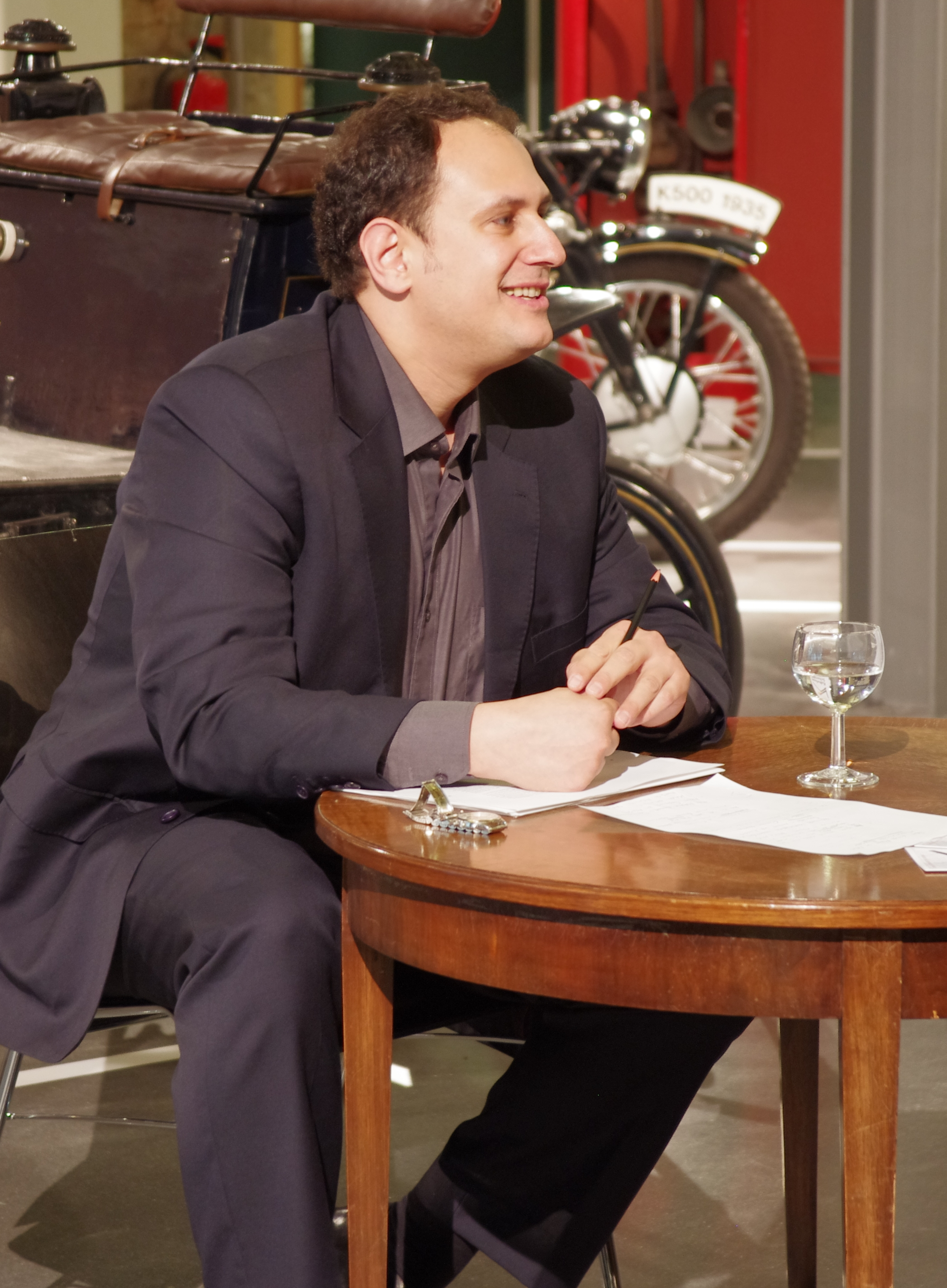 Der Journalist Daniel-Dylan Böhmer bei einer Lesung in Schorndorf, Februar 2014.